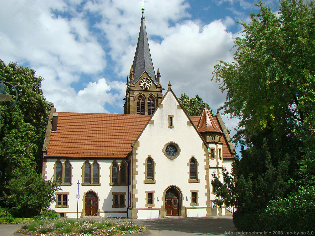 Evang. Pankratiuskirche in Heilbronn-Böckingen